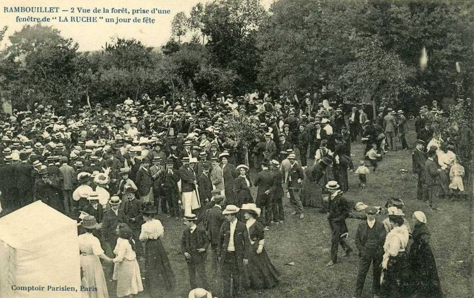 carte postale éditée par l'imprimerie de la Ruche : une grande fête annuelle était l'occasion de communiquer sur l'expérience de la Ruche, et de collecter des fonds